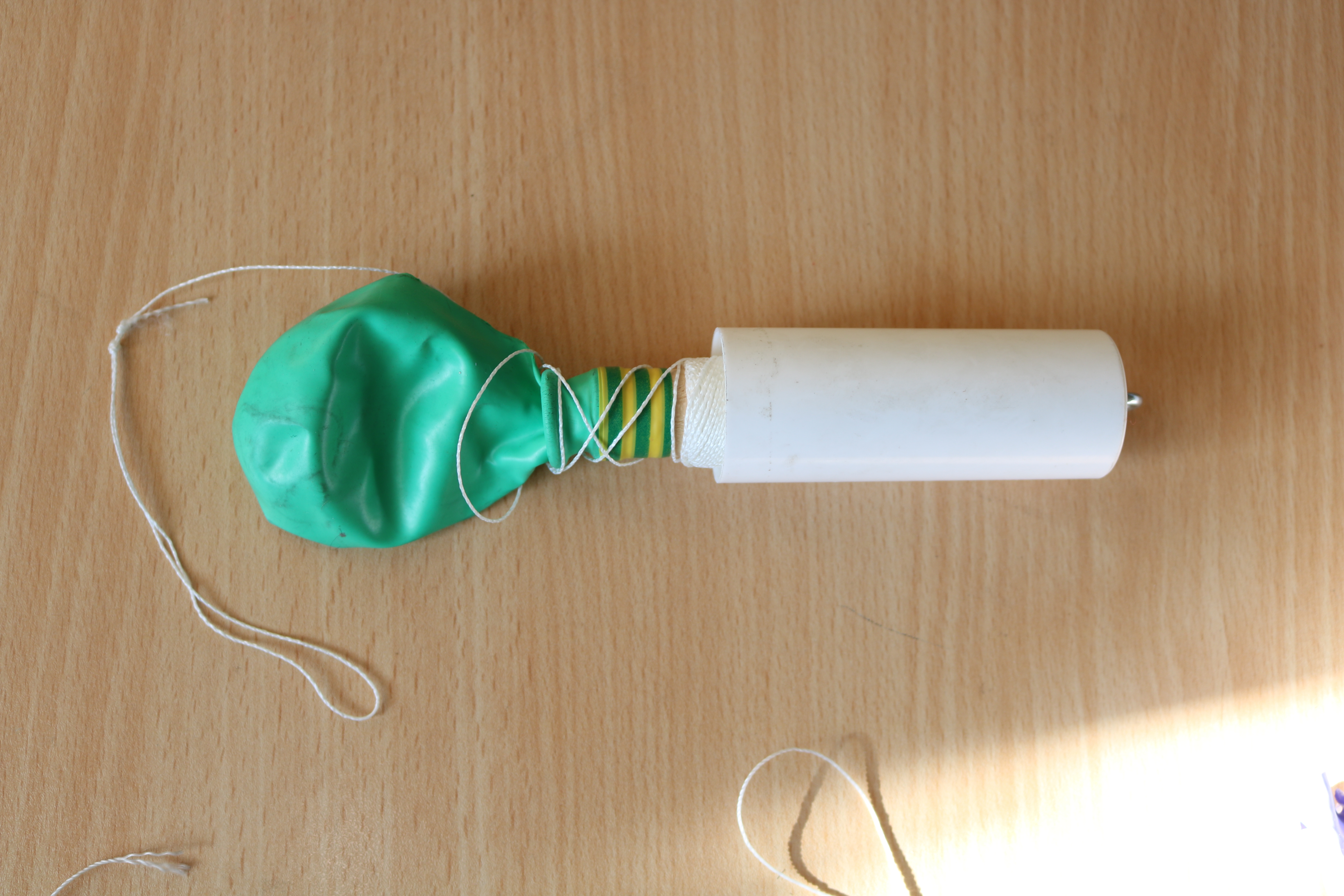 نخ بازکن بادکنک دار مربوط به رادیوسوند فرانسوی که مجهز به وسیله برای سامانه پرتاب خودکار رادیوسوند است